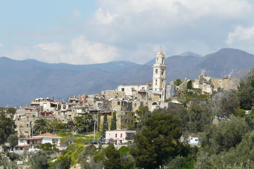 Foto varie di Bussana Vecchia, Sanremo, Liguria, Italia